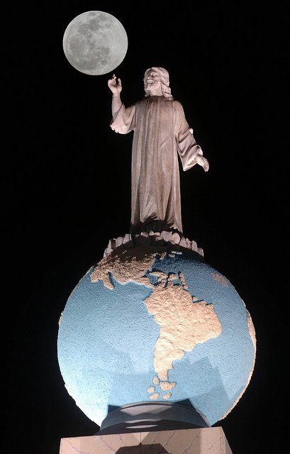 Estatua del Divino Salvador del Mundo, San Salvador (El Salvador)